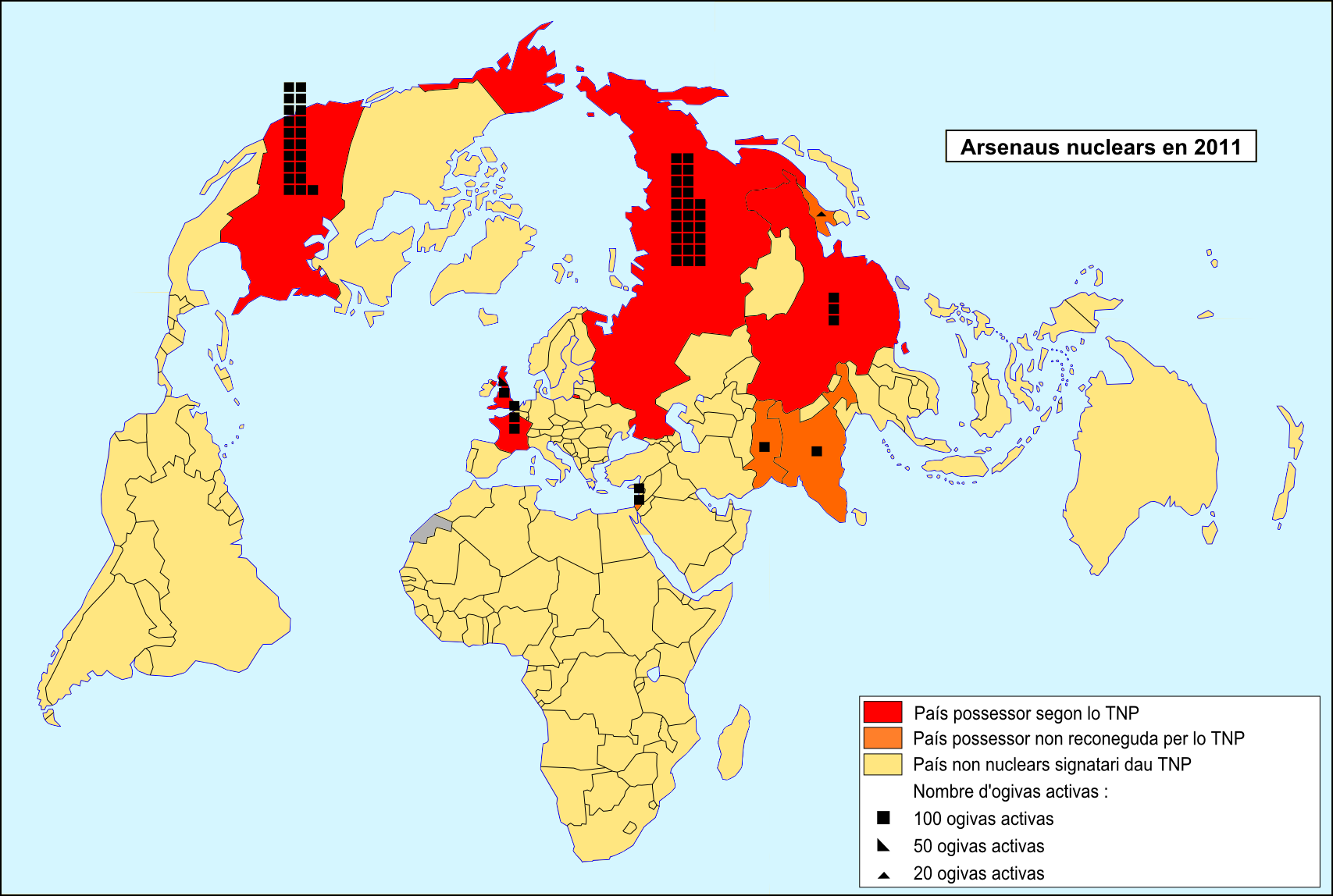 Arsenaus nuclears en 2011.